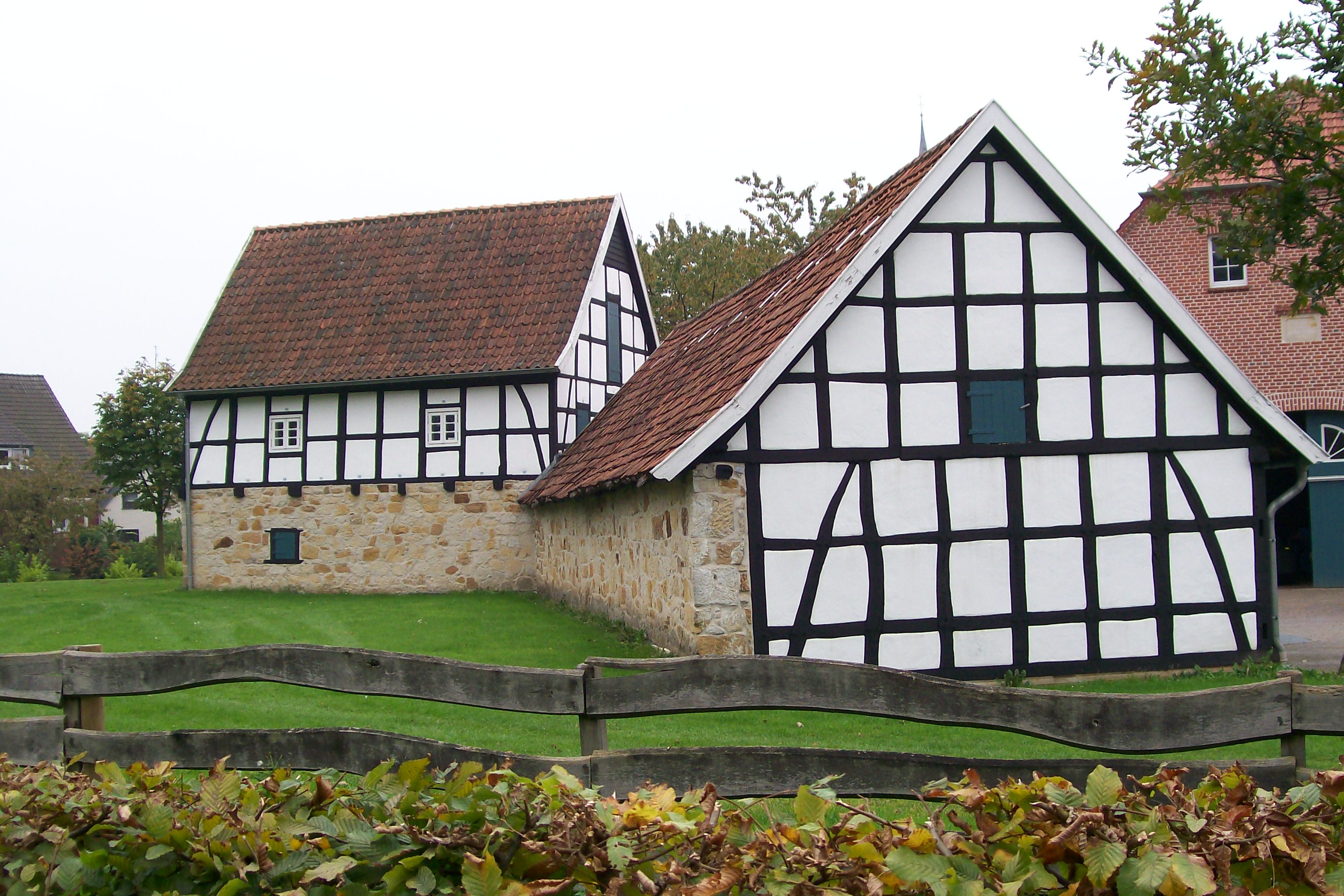 Averbecks Speicher, Heimatmuseum in Bad Iburg-Glane, Museumsspeicher links